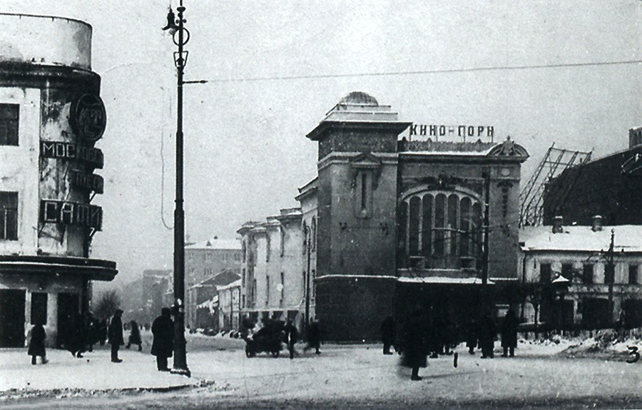 Кинотеатр "Горн" (переименованный "Пегас")